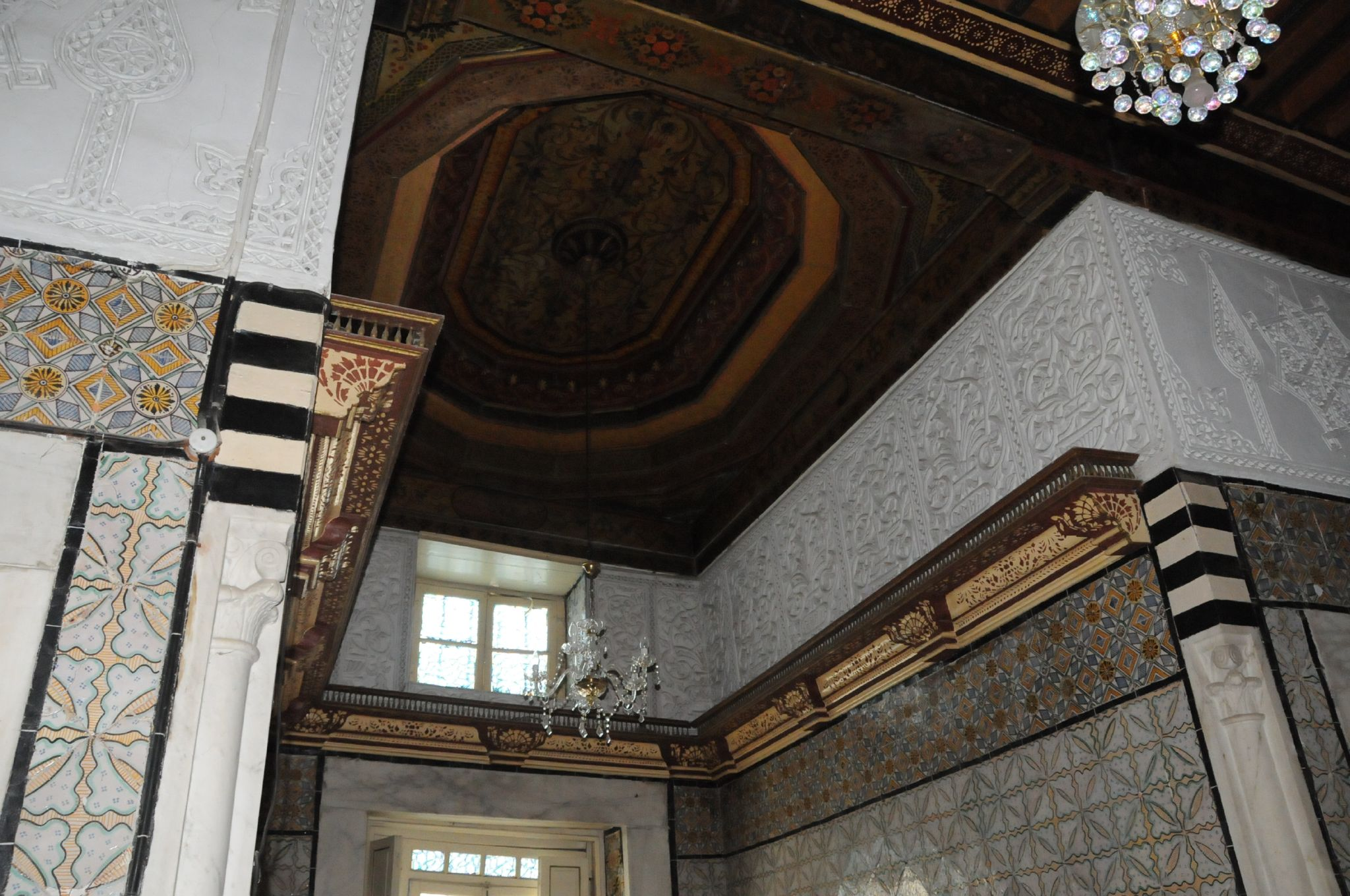 Exemple d'architecture du plafond d'un Kbou dans la médina de Tunis, Tunis, Tunisie